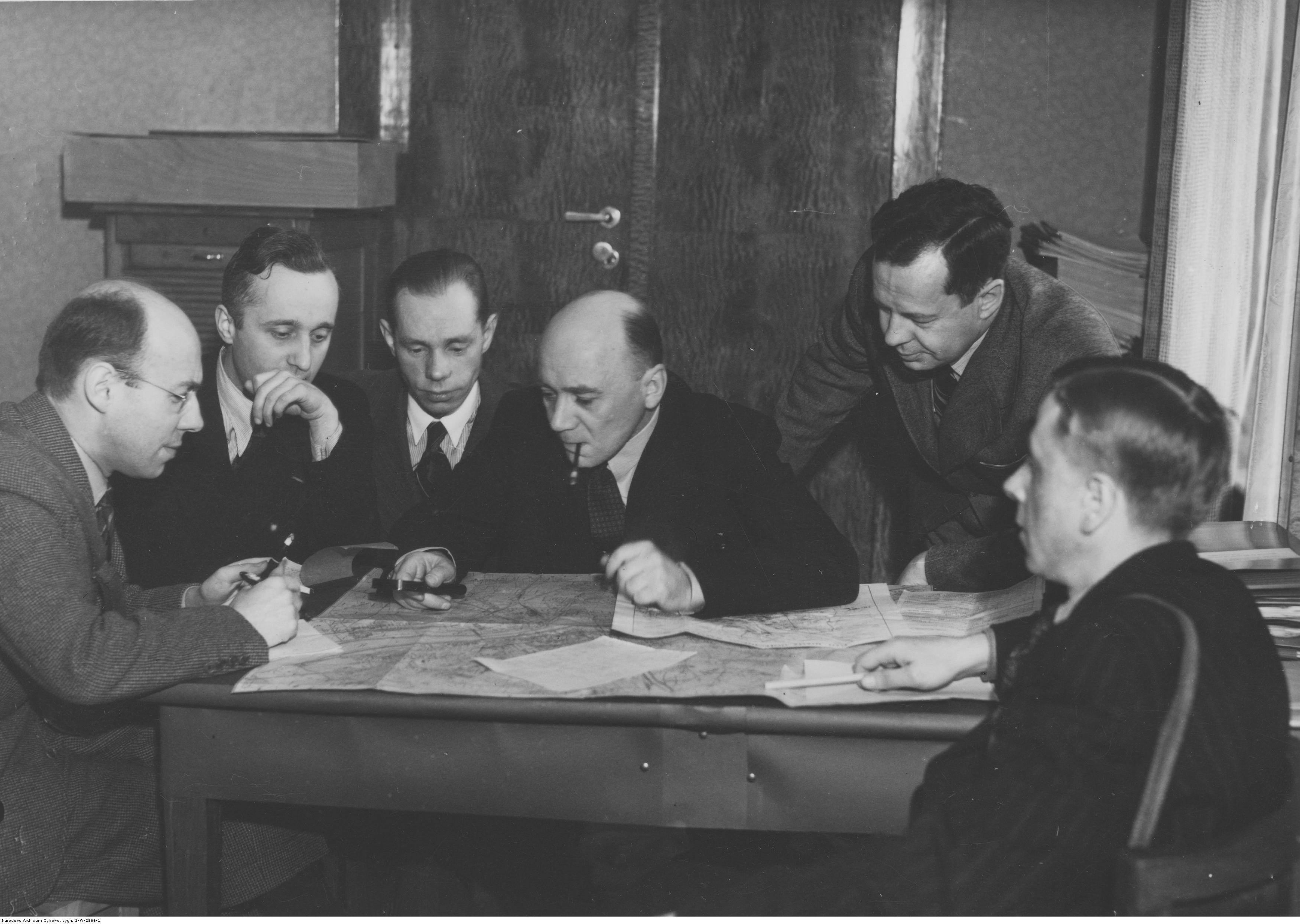 Pokaz obrony przeciwlotniczo-gazowej w Warszawie. Alarm gazowy. Odprawa dziennikarzy przez szefa sztabu kwatery prasowej płk. Abżółtowskiego (w środku). Koncern Ilustrowany Kurier Codzienny - Archiwum Ilustracji. Sygnatura: 1-W-2866-1